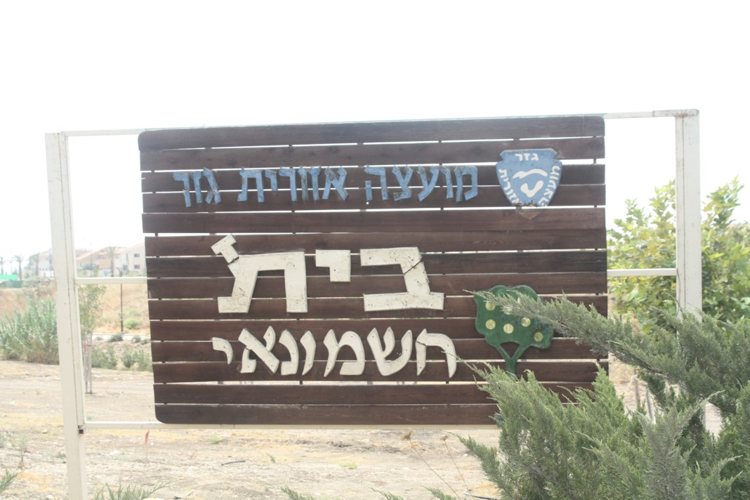 בית חשמונאי Beit Hashmonay